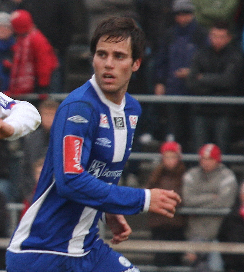 Martin_Wiig, Sarpsborg 08